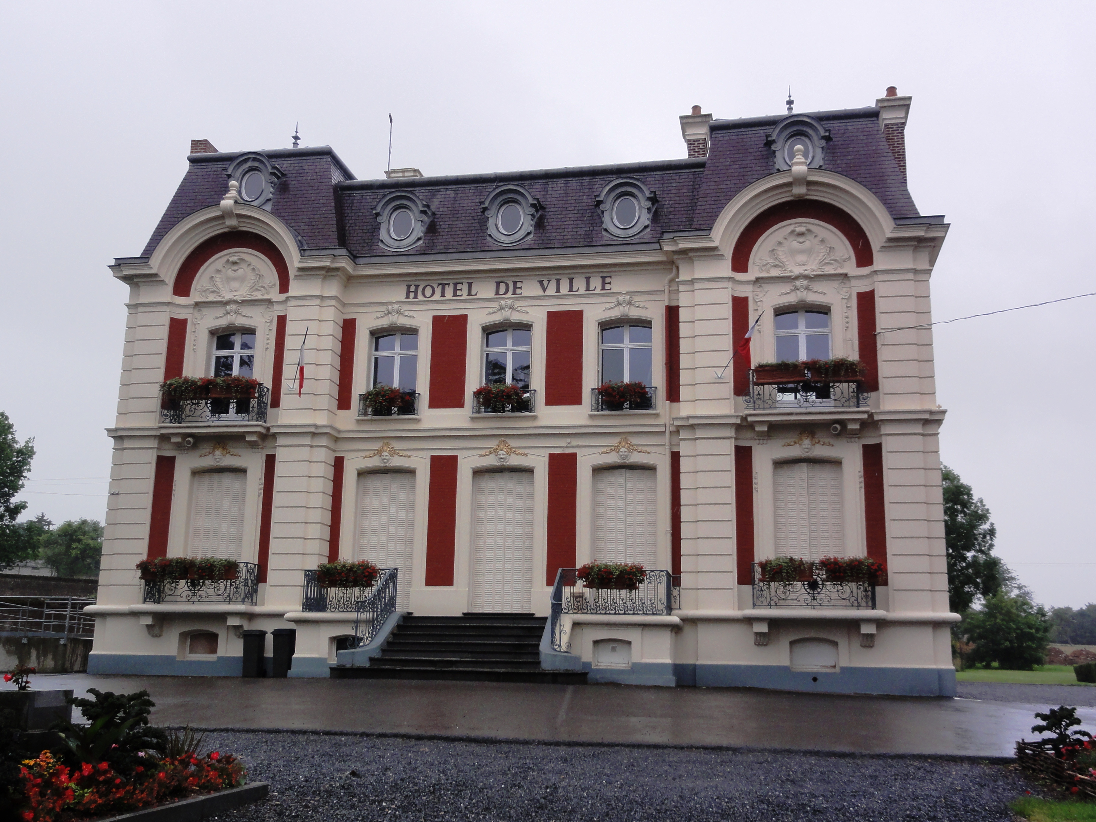 Wignehies (Nord, Fr) mairie